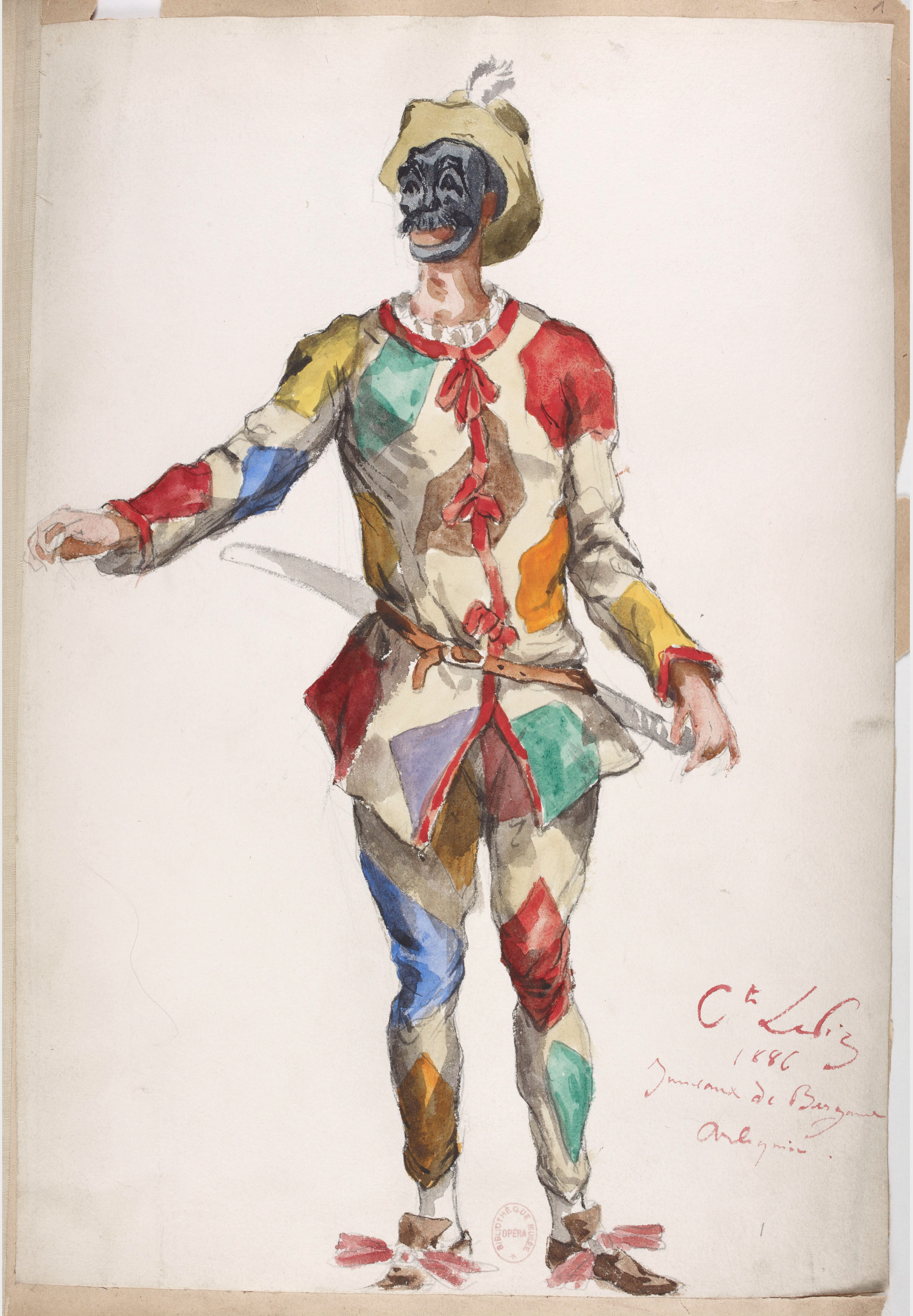 Costume d'Arlequin pour le ballet Les Jumeaux de Bergame